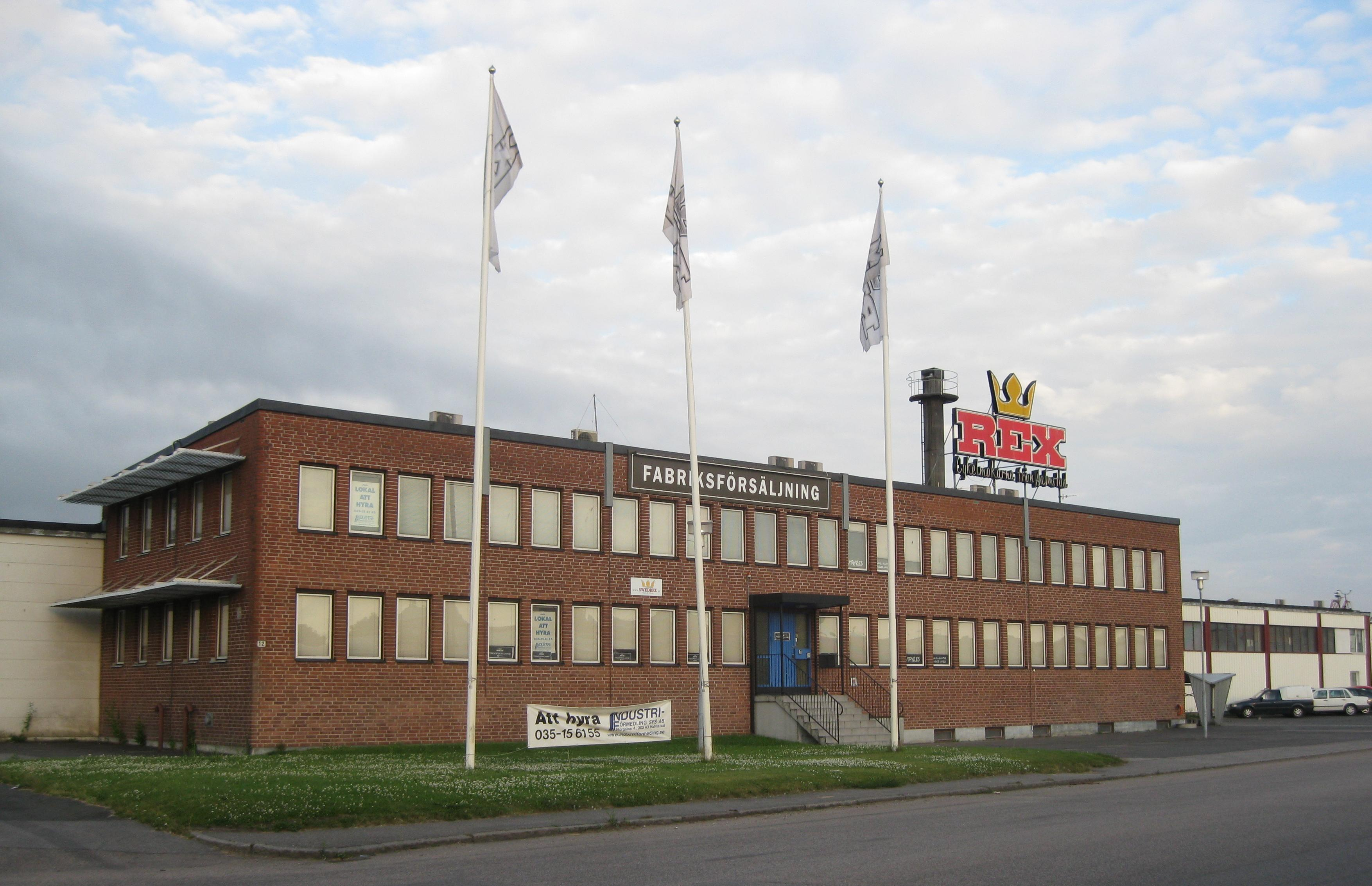 Cykeltillverkaren Rex fabrik i Halmstad.